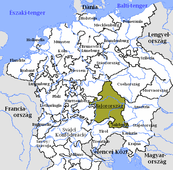 A Bajor körzet a Német-római Birodalomban